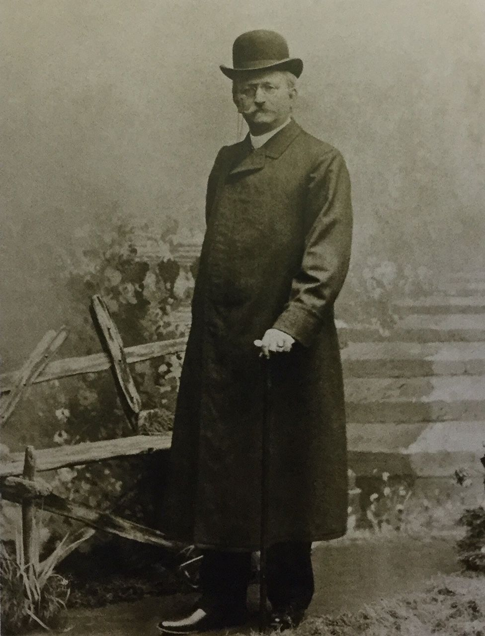 Johannes Fusangel MdR und Verleger (1852-1910)